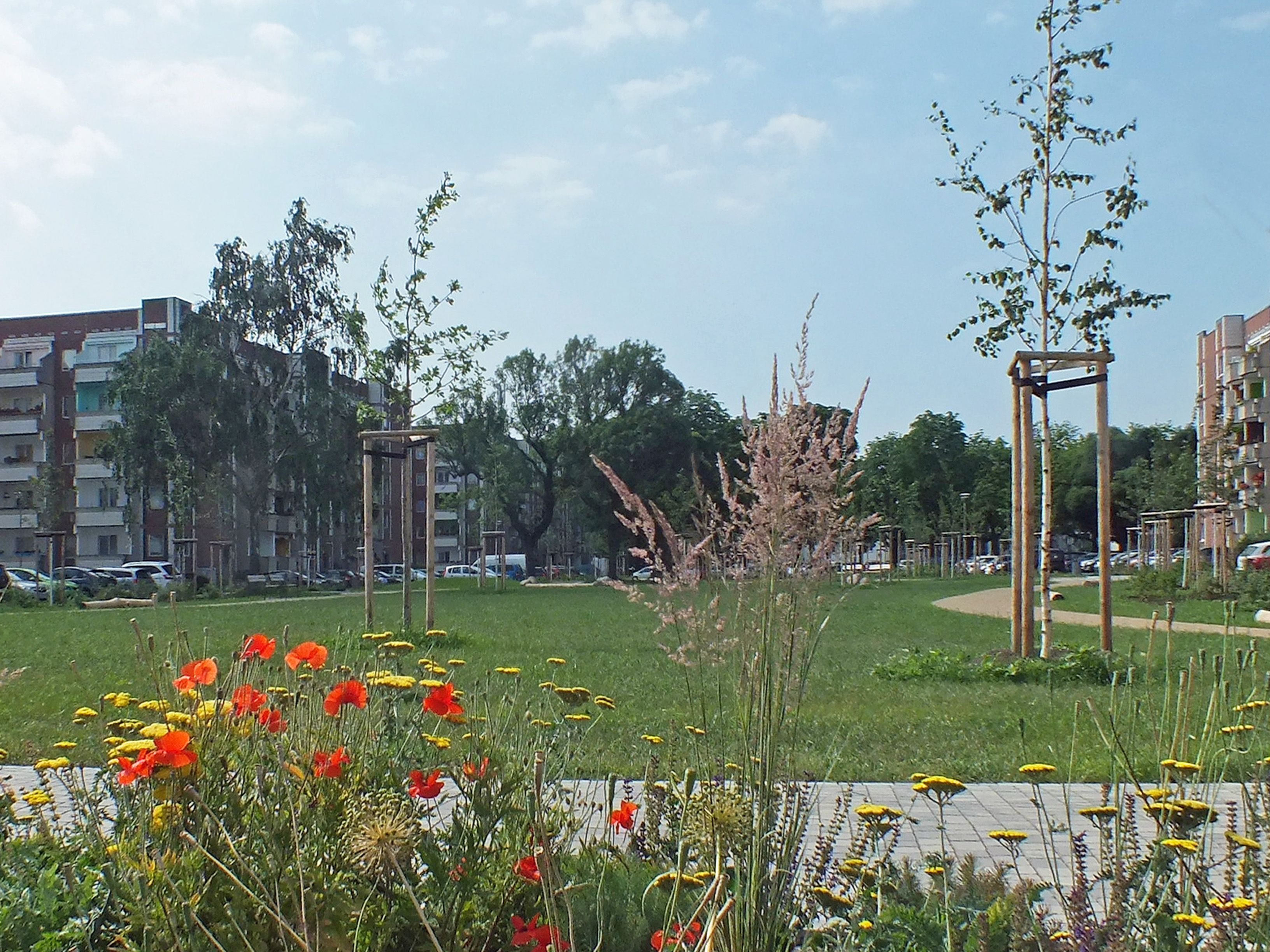 Cäcilenpark in Leipzig-Reudnitz, nach Süden